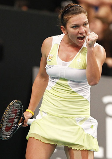 Simona Halep (ROU), qualifications, 1er tour, Open Gaz de France Suez, stade Pierre de Coubertin, Paris, dimanche 7 février 2010.